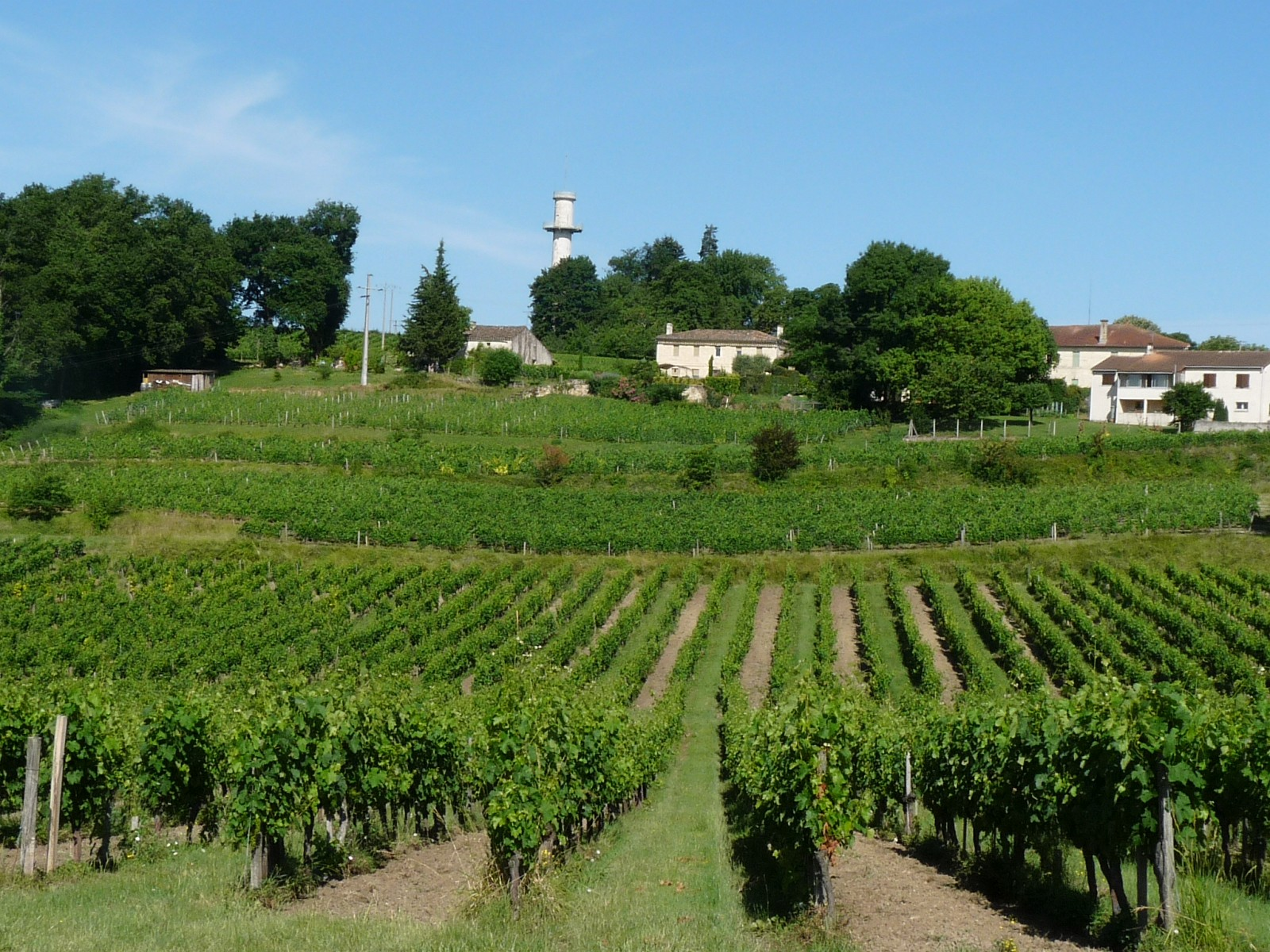 Vue de St-Cibard (entre la mairie et l'église), Gironde, France